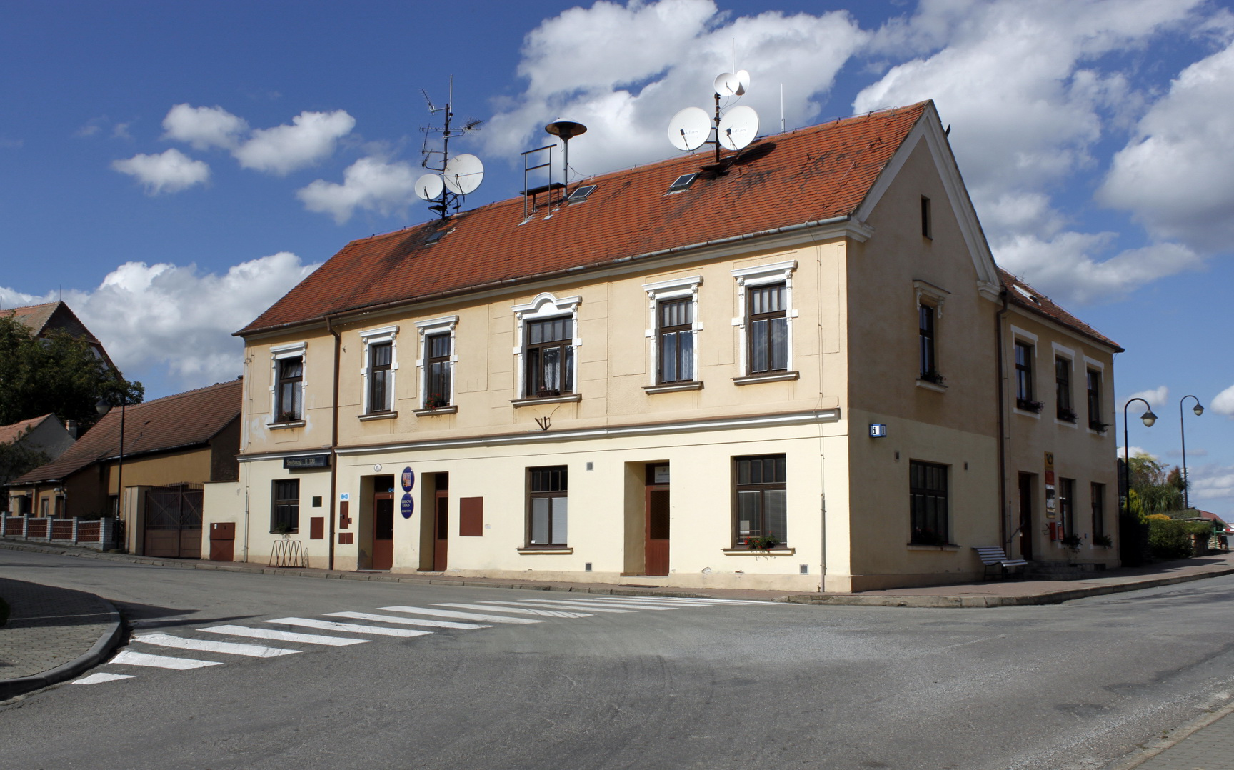 obecní úřad v Dukovanech